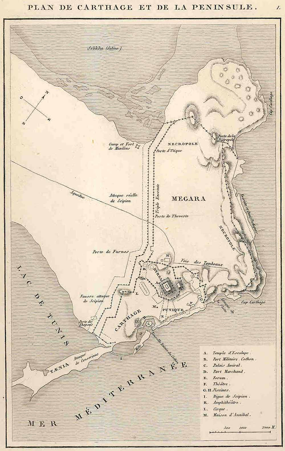 Plan de Carthage (punique et romaine) et de sa péninsule